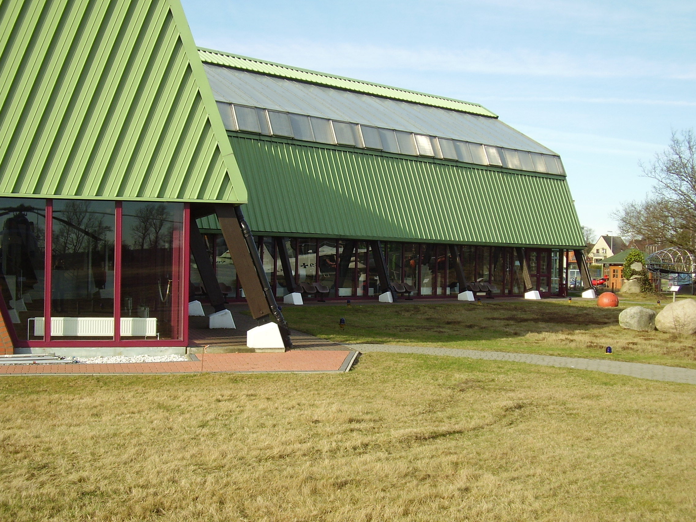 Aeronauticum in Nordholz, Luftschiffe, Zeppelin, bei Cuxhaven, Luftfahrtmuseum